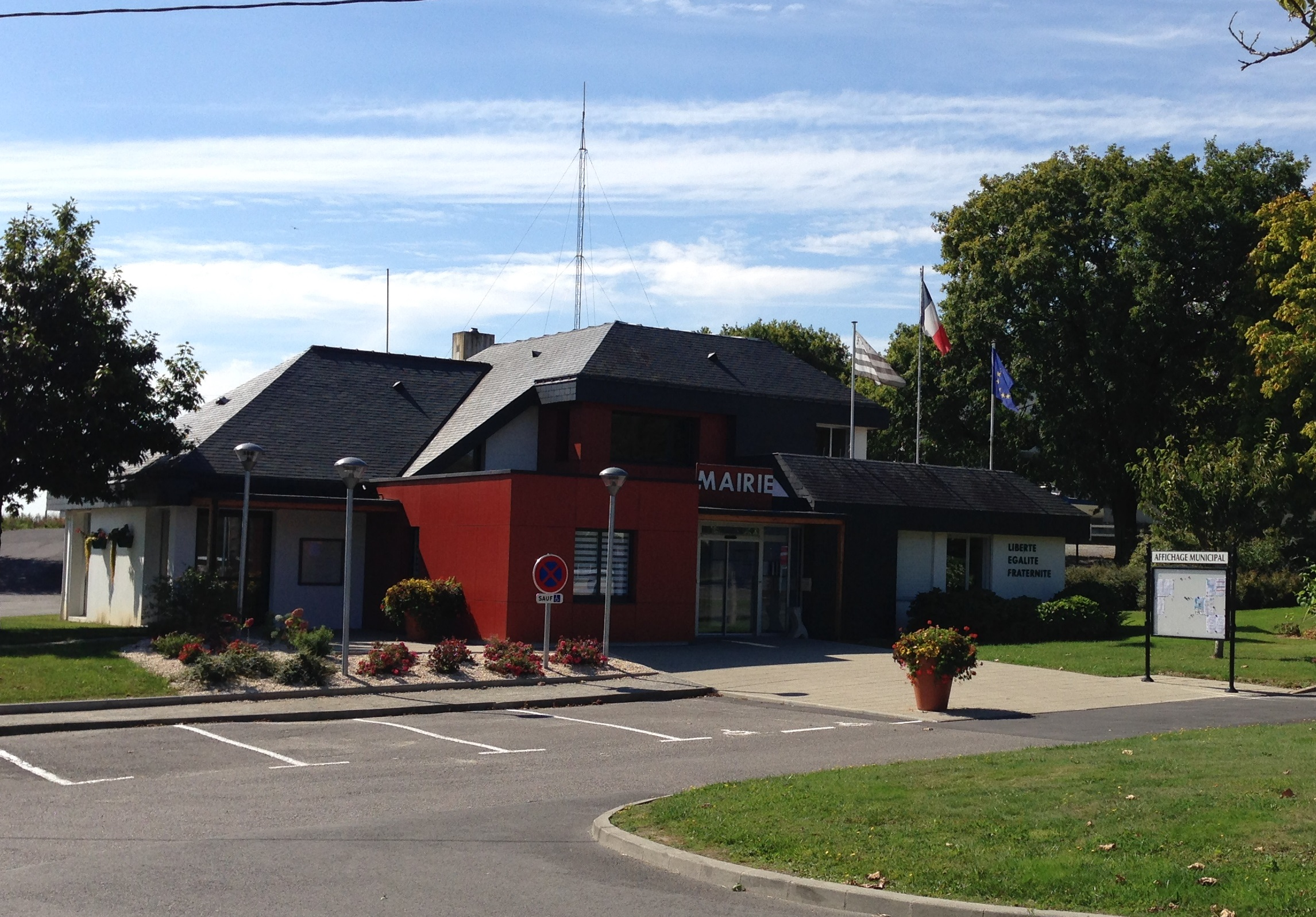 Mairie